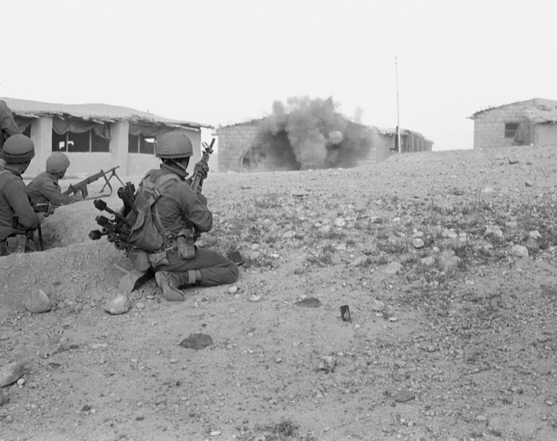 פעולת "כראמה", מבצע "תופת". צנחנים בלחימה בפאתי העיירה. העשן בין הבתים מפיצוץ מבני מחבלים.